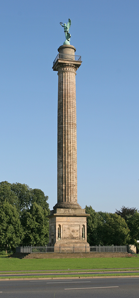 Waterloosäule, Hannover, Germany